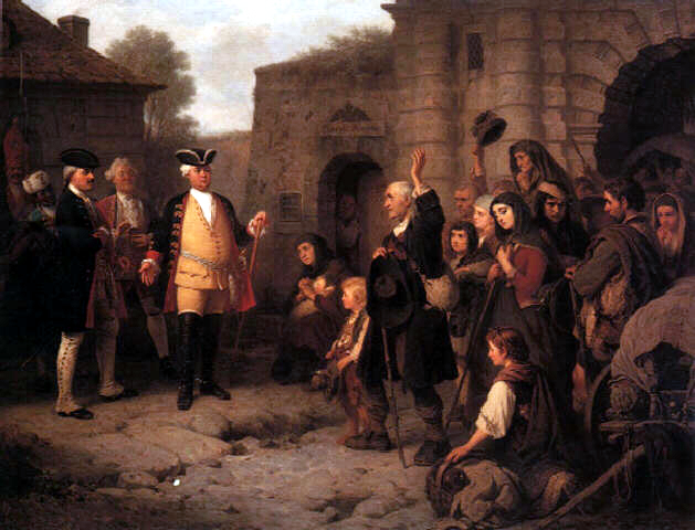 Konstantin Johann Franz Cretius: Empfang der Salzburger Protestanten durch König Friedrich Wilhelm I. in Berlin am Leipziger Tor am 30.April 1732 Medium Oil on Canvas Größe 43,1 x 55,9 in. / 109,5 x 142 cm. Bez. Signed Verkauft durch Sotheby's Munich: Dienstag, 2.Dezember 1997